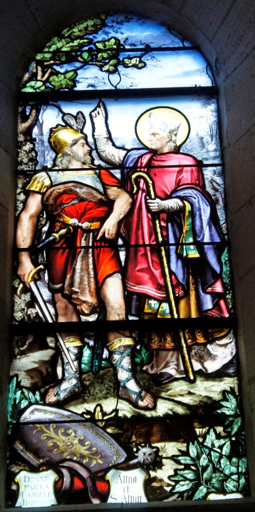 vitrail représentant Attila et St Alpin, église de Hans.